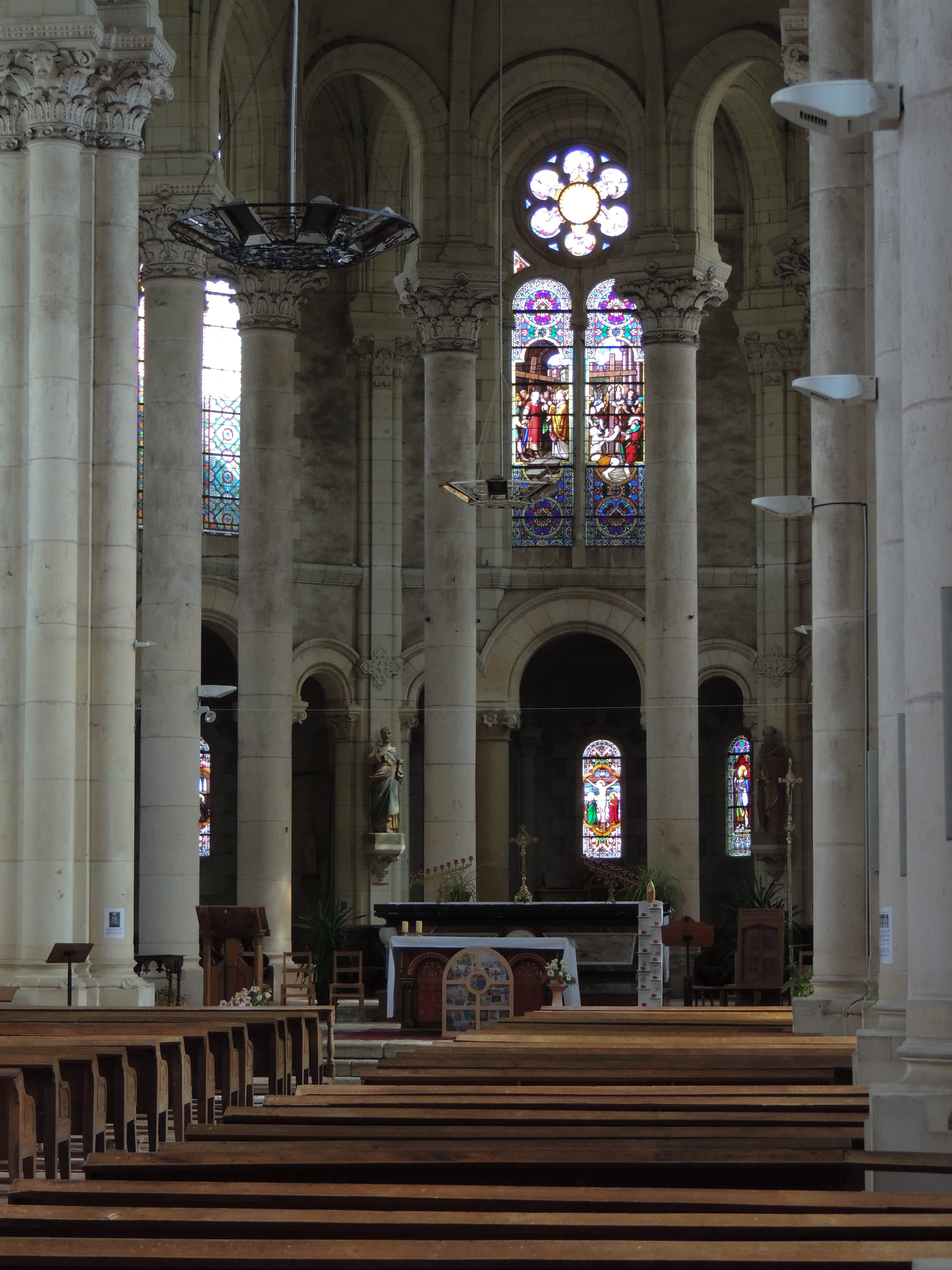 Vue intérieure de l'église Sainte-Croix de Rochefort-sur-Loire (Maine-et-Loire, France).